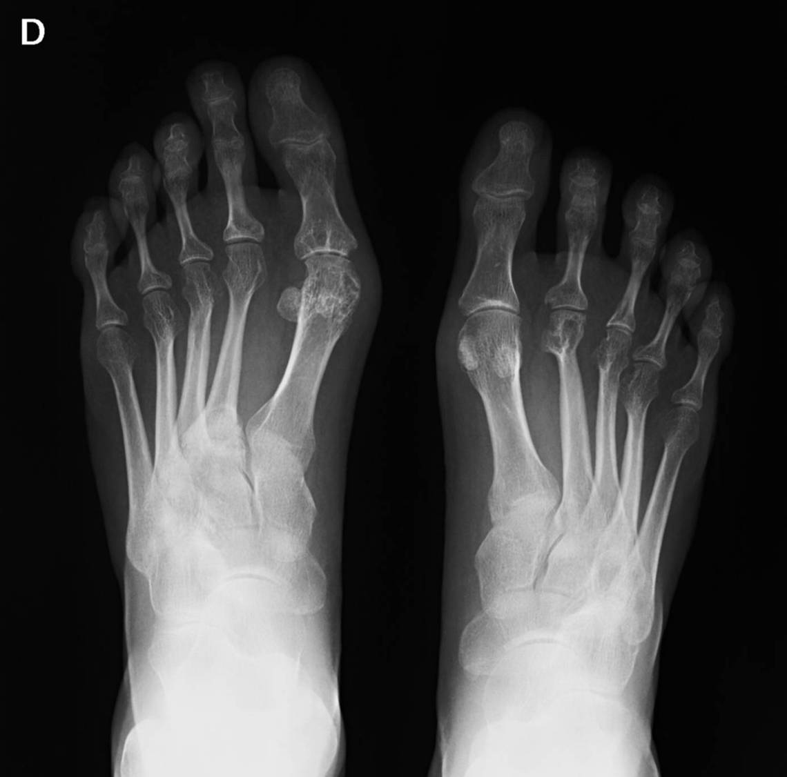 Radiografía de pies con artritis reumatoide